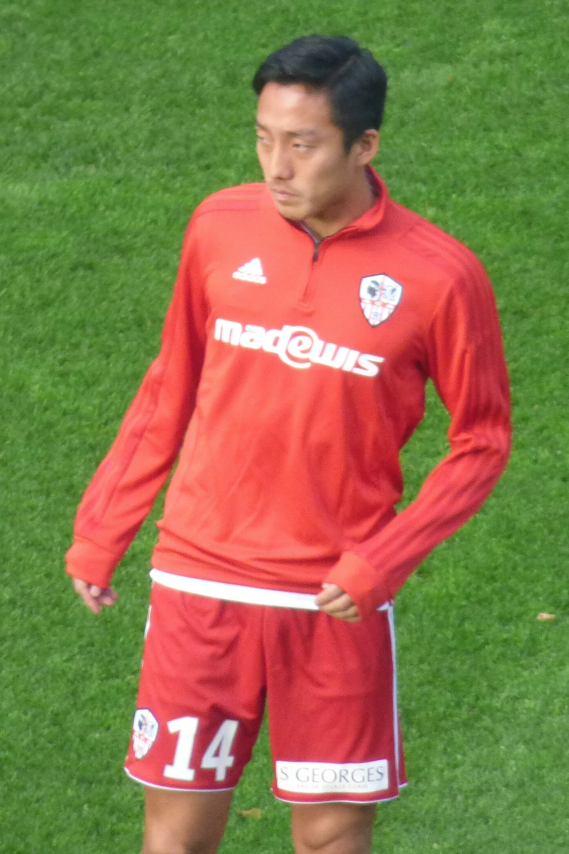 Naoto Sawai avant le match RC Lens - AC Ajaccio, comptant pour la dix-neuvième journée du championnat de France de Ligue 2 2018-2019, le 22 décembre 2018, au Stade Bollaert-Delelis de Lens.